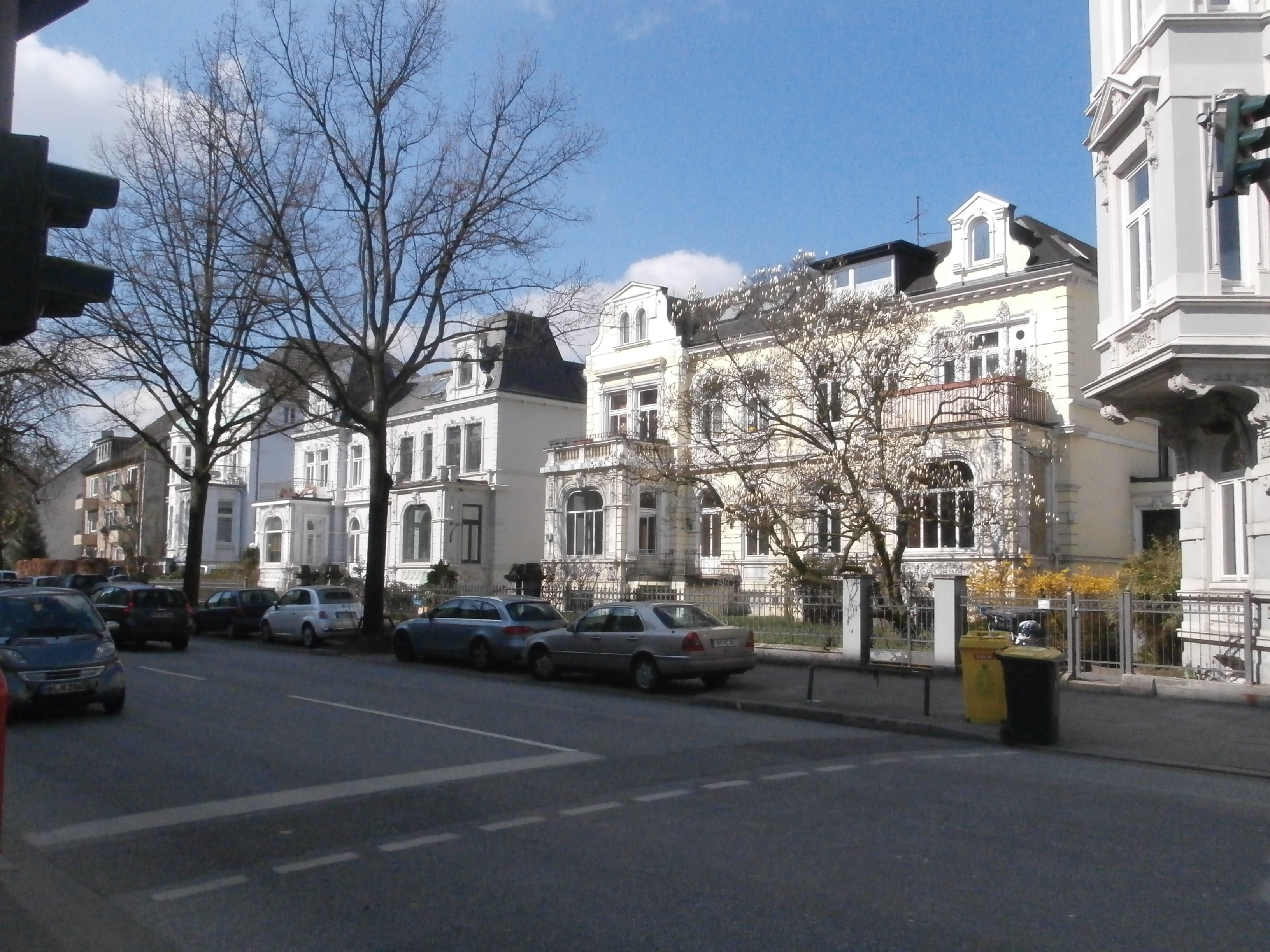 Denkmalgeschütztes Reihenvillen-Ensemble in Hamburg-Ottensen